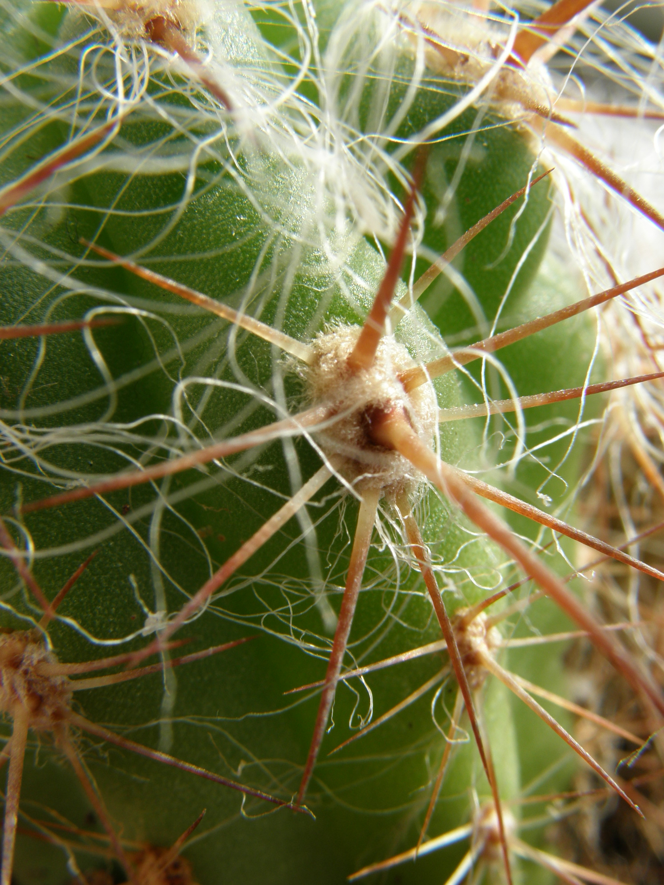 Photo du cactus Oreocereus fossulatus, qui a de grandes épines et de longs poils.